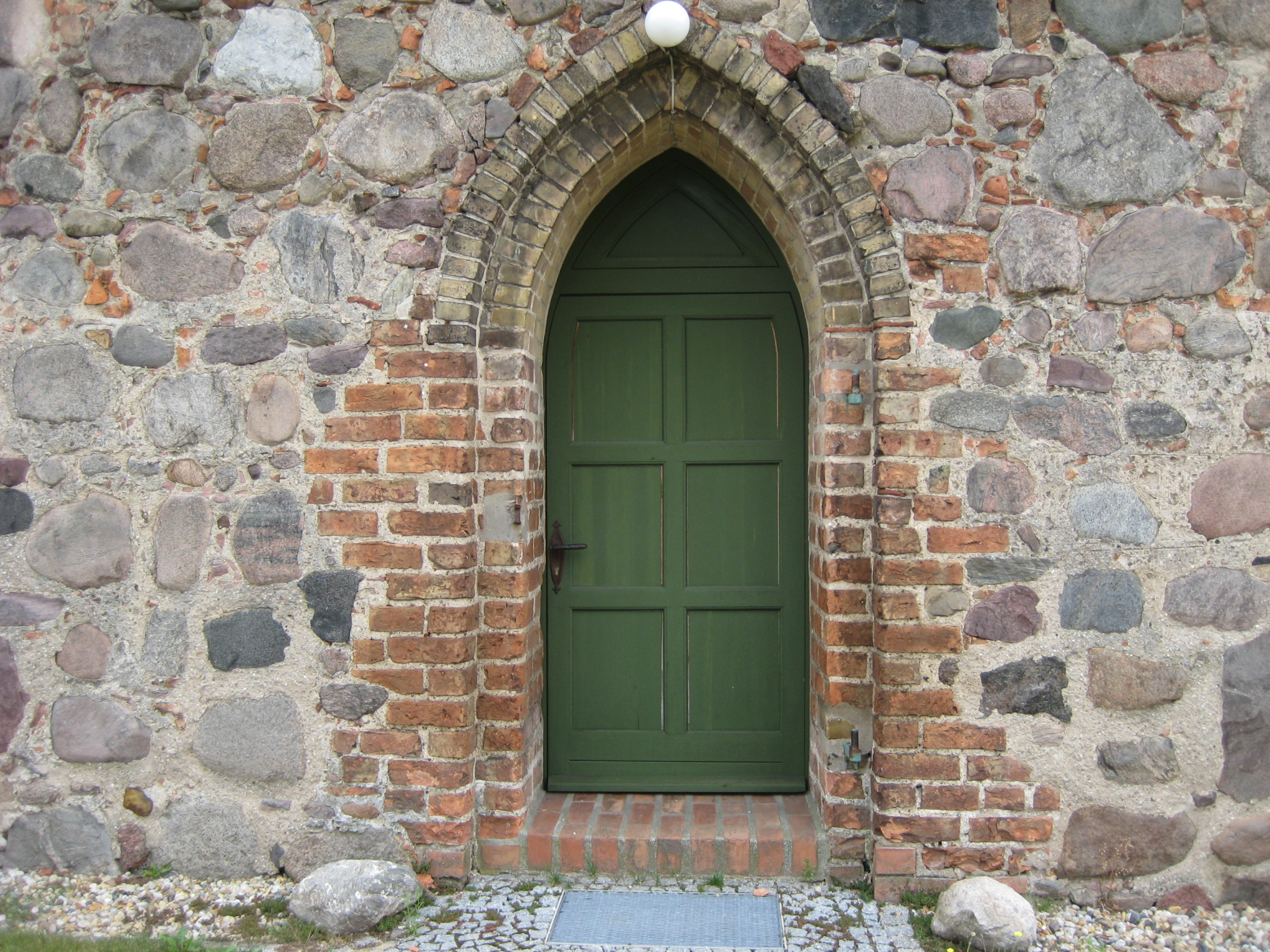 Dorfkirche Ahrensdorf